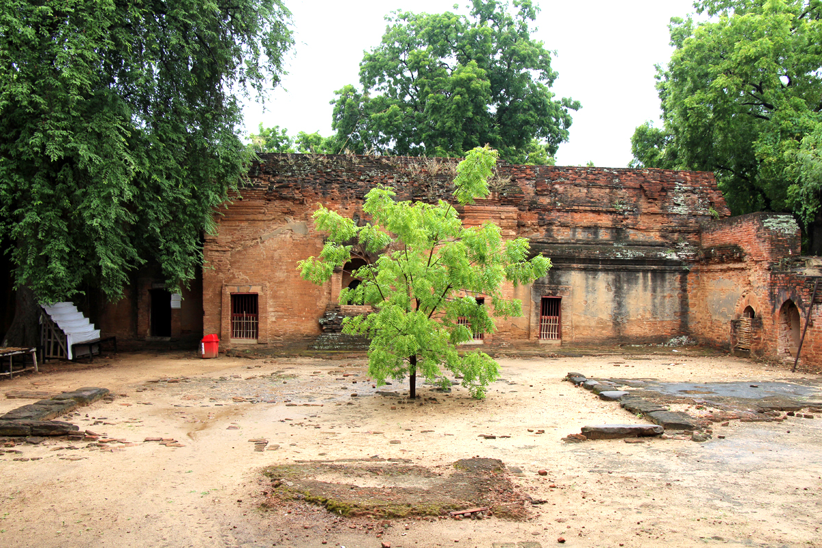 မြန်မာဘာသာ: ကျန်စစ်သားဥမင် အတွင်းပိုင်း